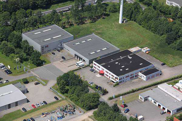 Liberty-Zentrale in Lübbecke.